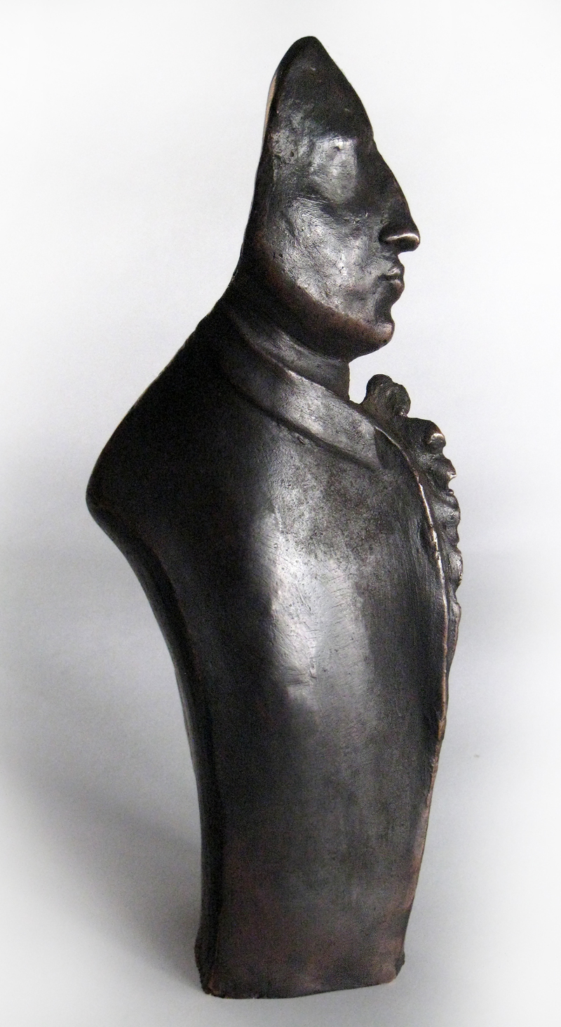 Statuetta di bronzo, opera dell'artista spagnolo Francisco Berndonces.